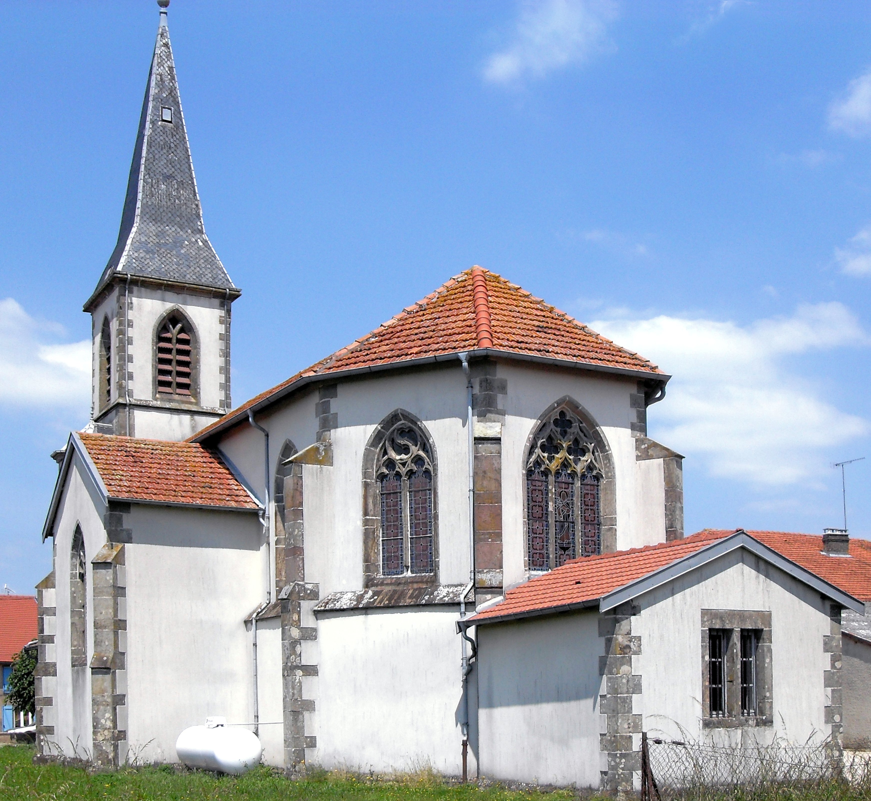 L'église Saint-Basle à Dombasle-en-Xaintois